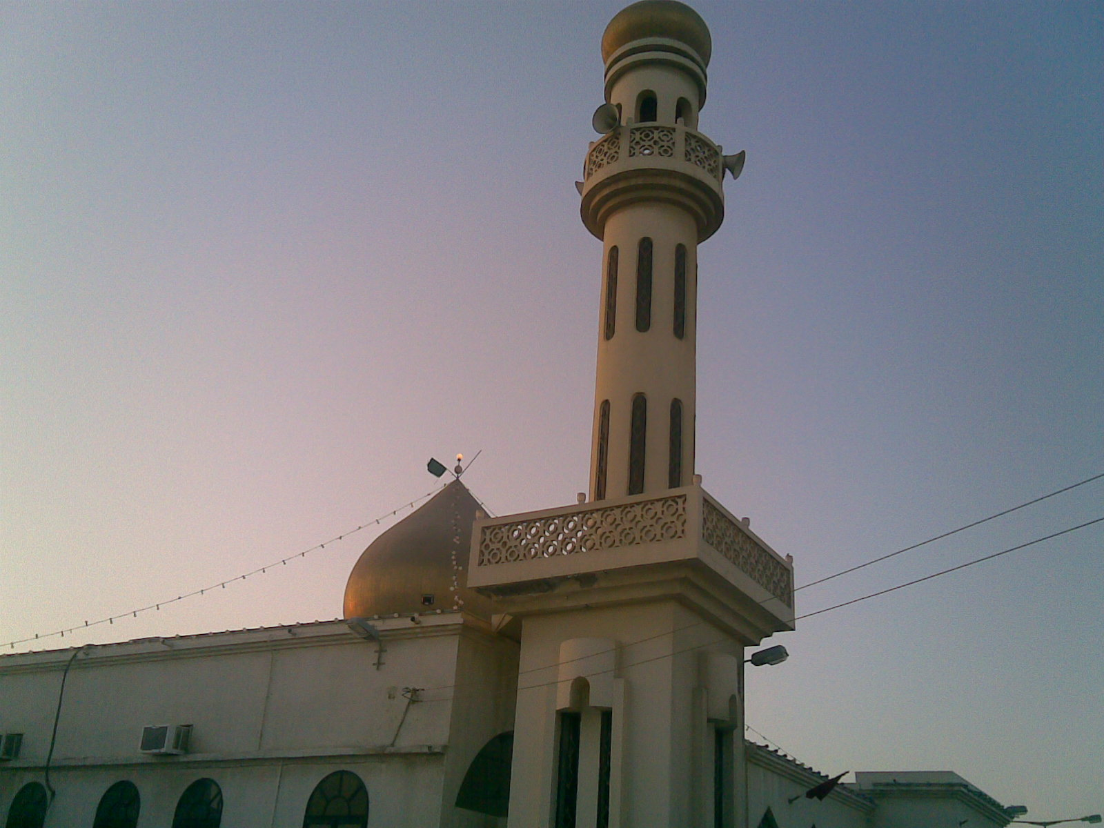 مسجد الشيخ سهلان في قرية العكر وبه مرقد العالمان الجليلان الشيخ سهلان والشيخ مقبل.